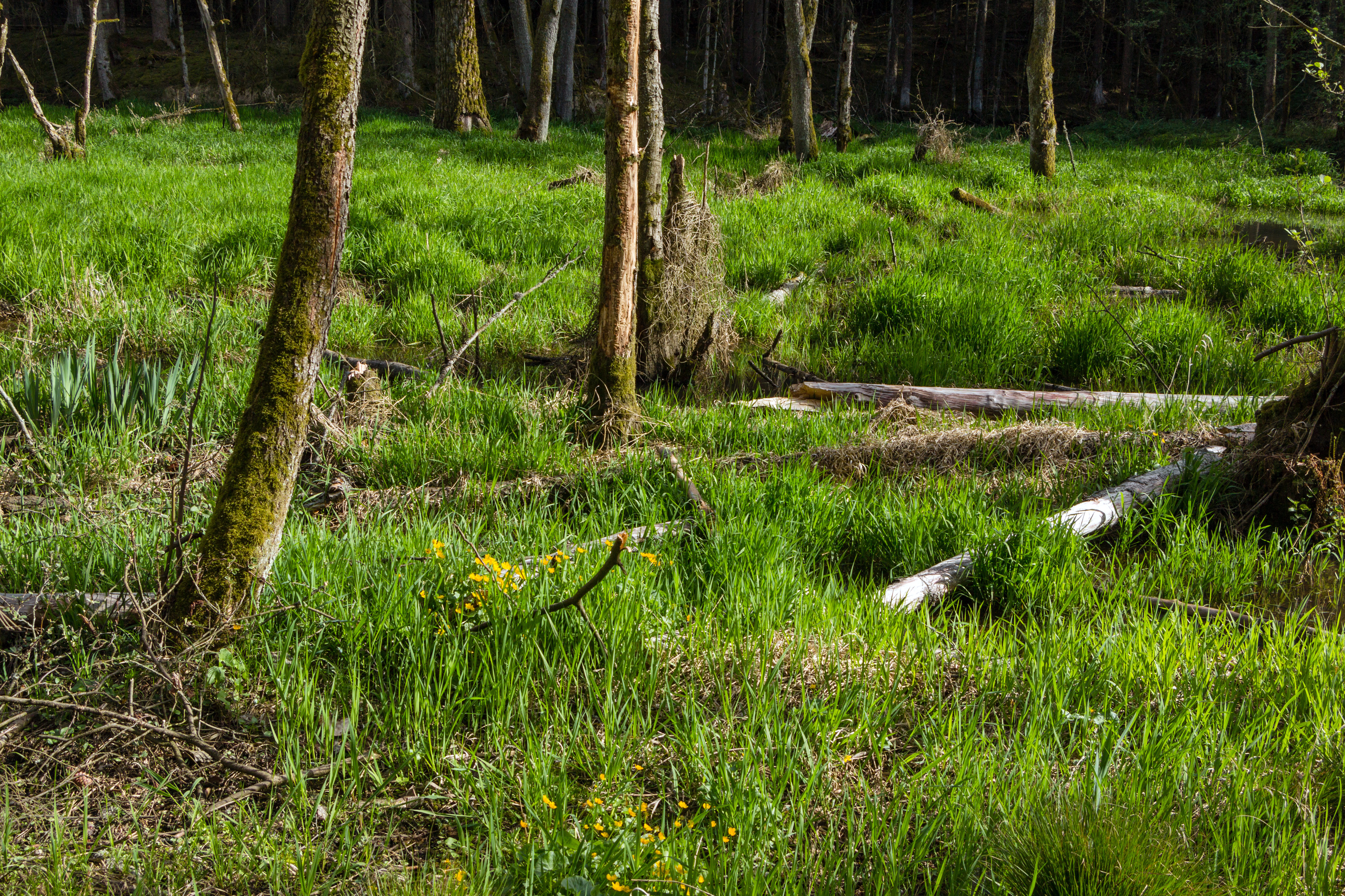 Aue des Röthenbachs östlich von Ungelstetten, Vogelschutzgebiet Nürnberger Reichswald